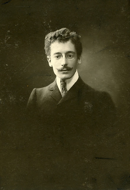 Portrait de Victor Segalen par Louis Talbot